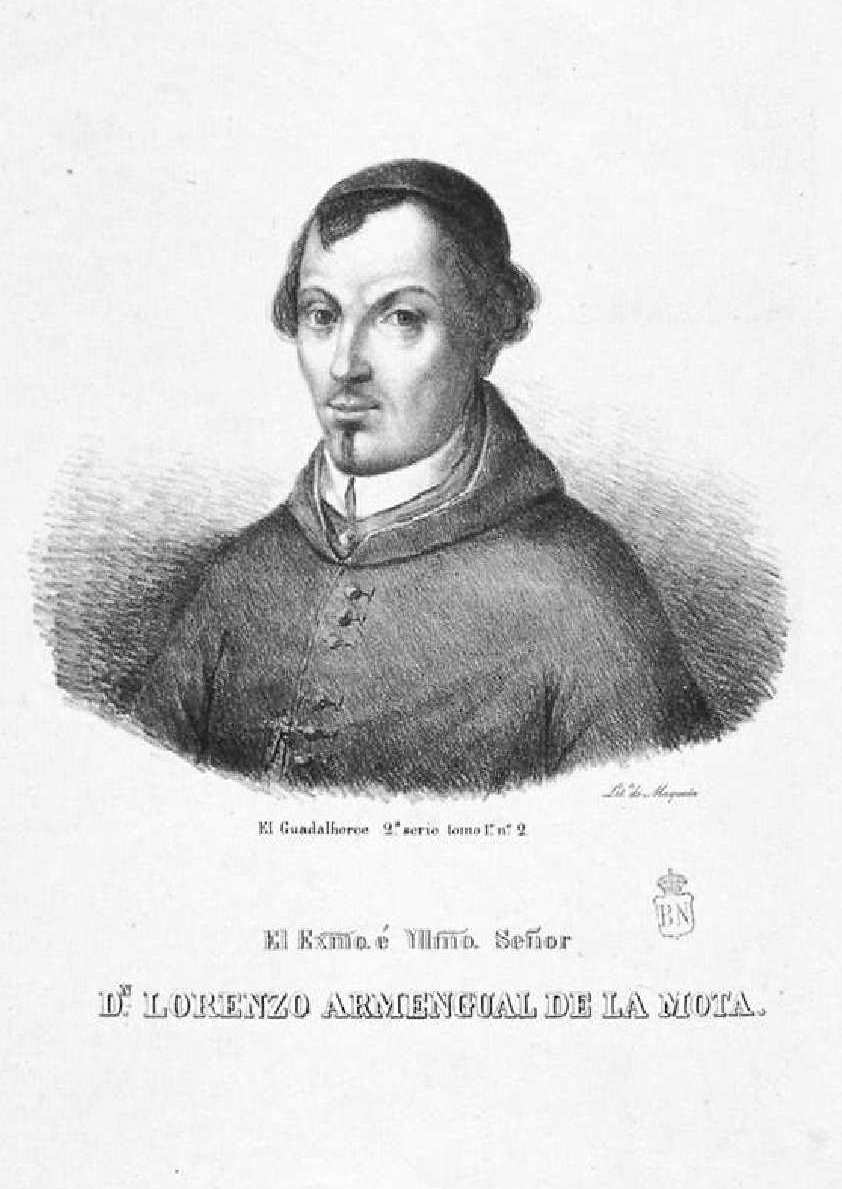 Retrato de Lorenzo Armengual de la Mota, litografía de Maqueda, 1840